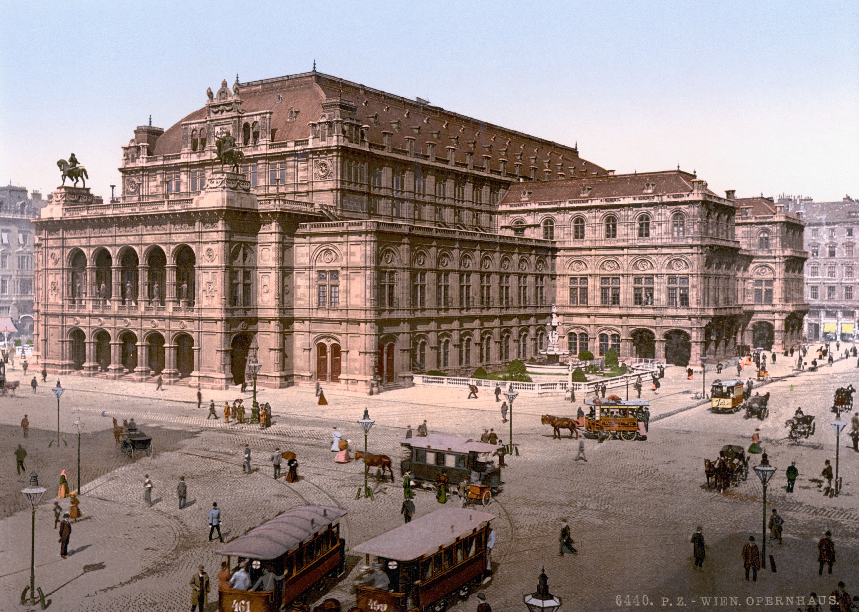 Das Wiener Opernhaus an der Ringstraße zwischen 1890 und 1900.